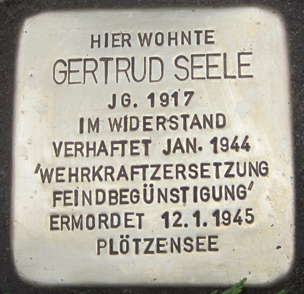 Stolperstein Gertrud Seele (1917-1945)